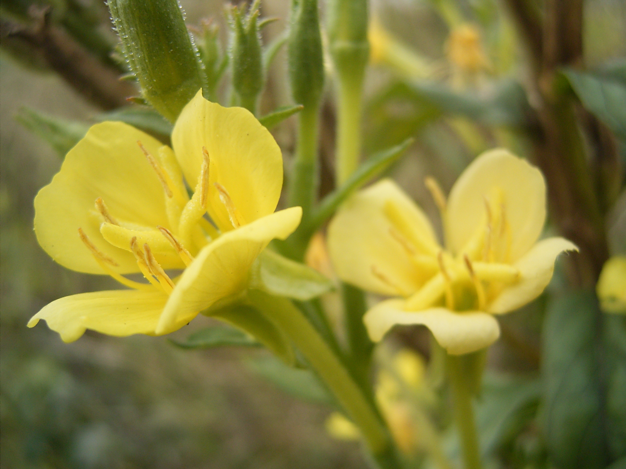 Deze foto toont een close up van de bloemen van de Kleine teunisbloem. Ik naam de foto op 1 augustus 2005 bij mariahoeve in Den Haag. This pic shows a close up of a flower of Oenothera parviflora. I took the picture on august 1, 2005 in The Hague, Netherlands.